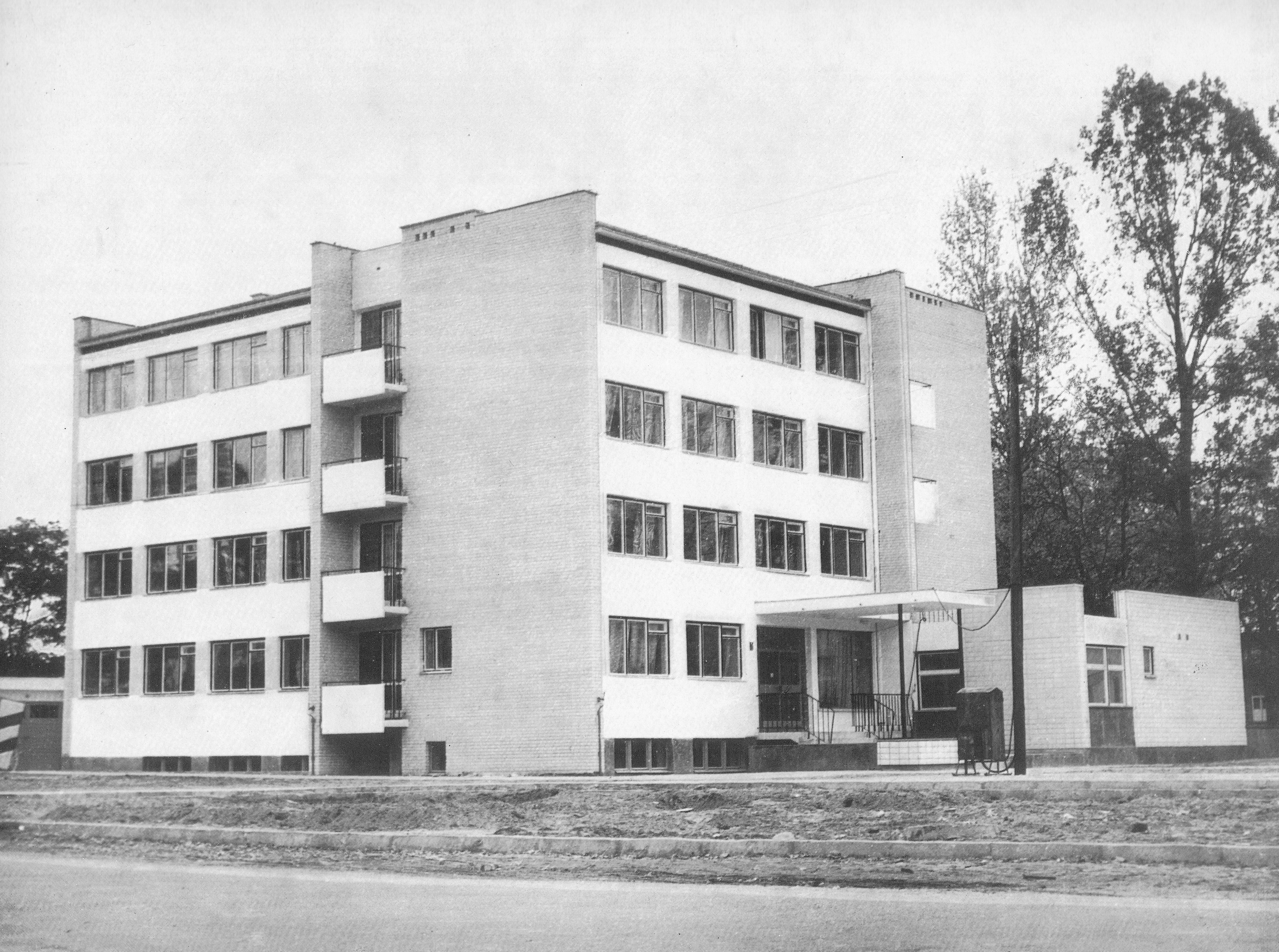 Hotel robotniczy Elektrociepłowni w Ostrołęce